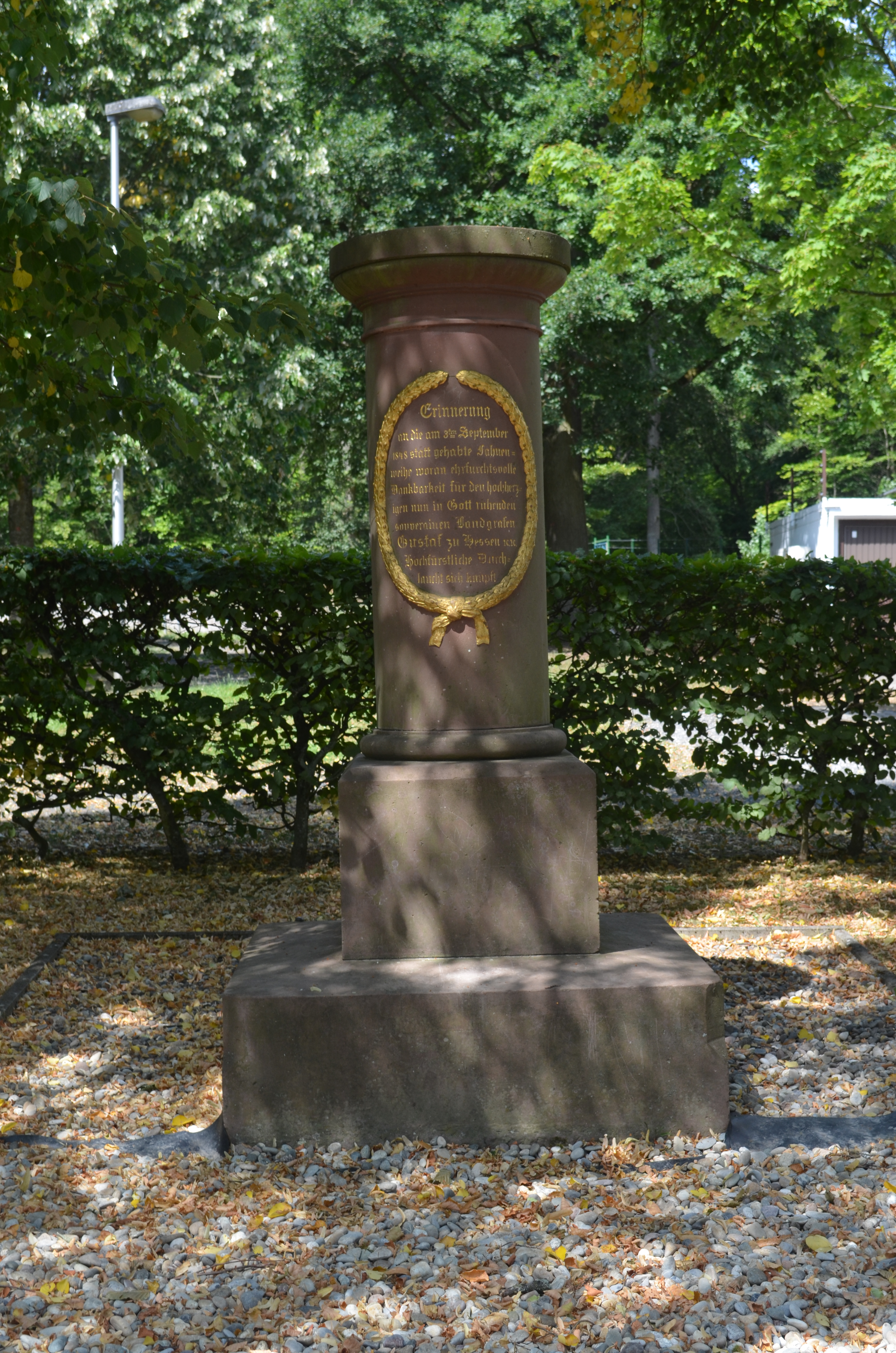 Seulberg, Hardtwaldallee 28, Gedenksäule, Naturdenkmal